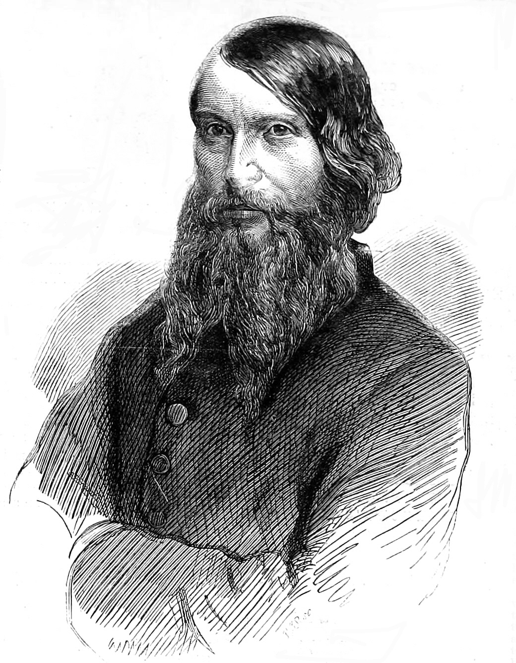 Thaddeus Hyatt